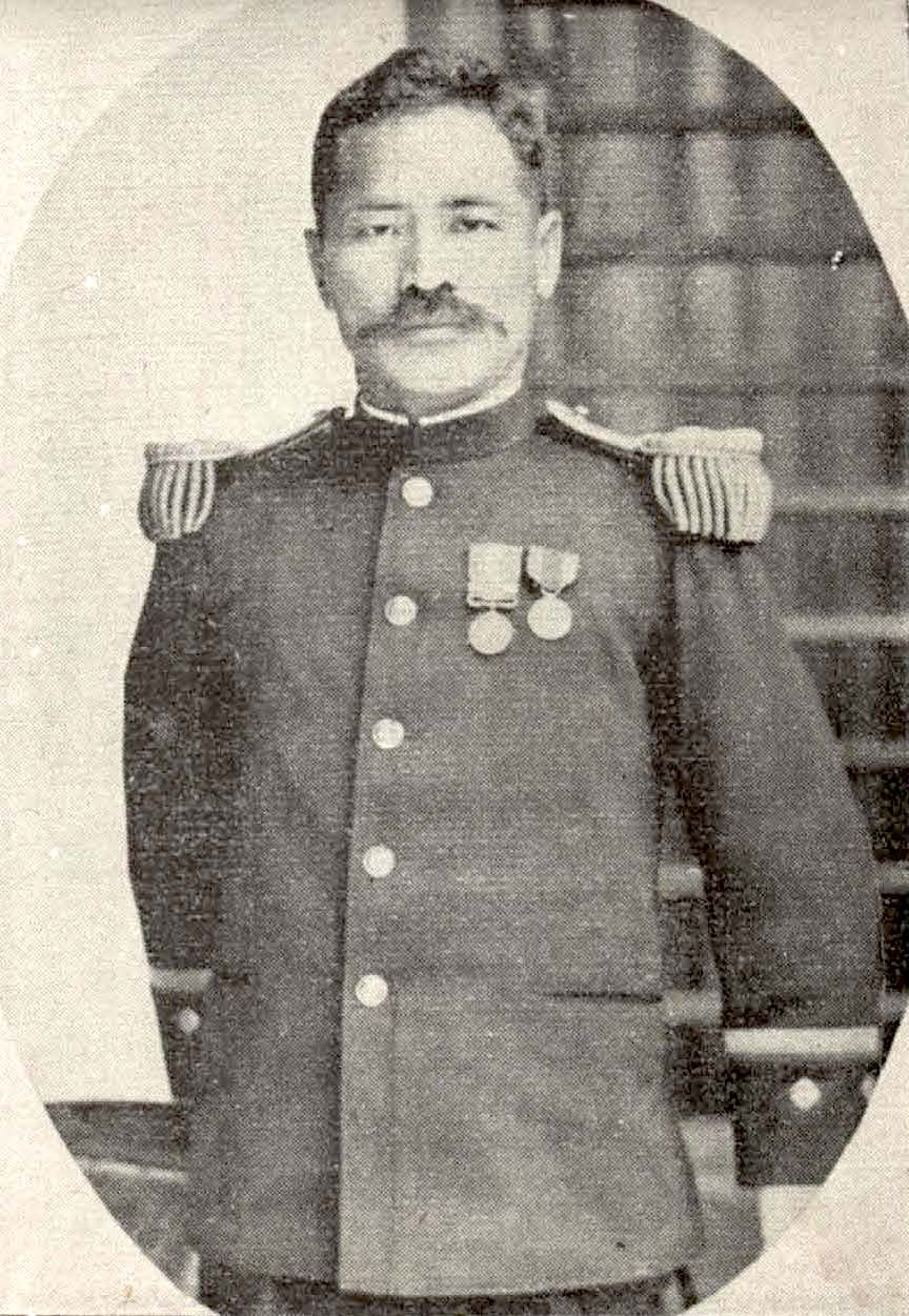 Bân-lâm-gú: 石橋亨 Ishibashi Tooru